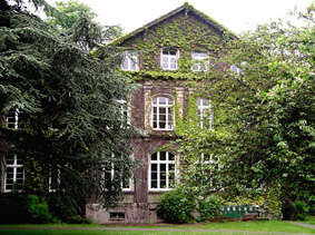 Fronberghaus auf dem Gelände der Kaiserswerther diakonie in düsseldorf